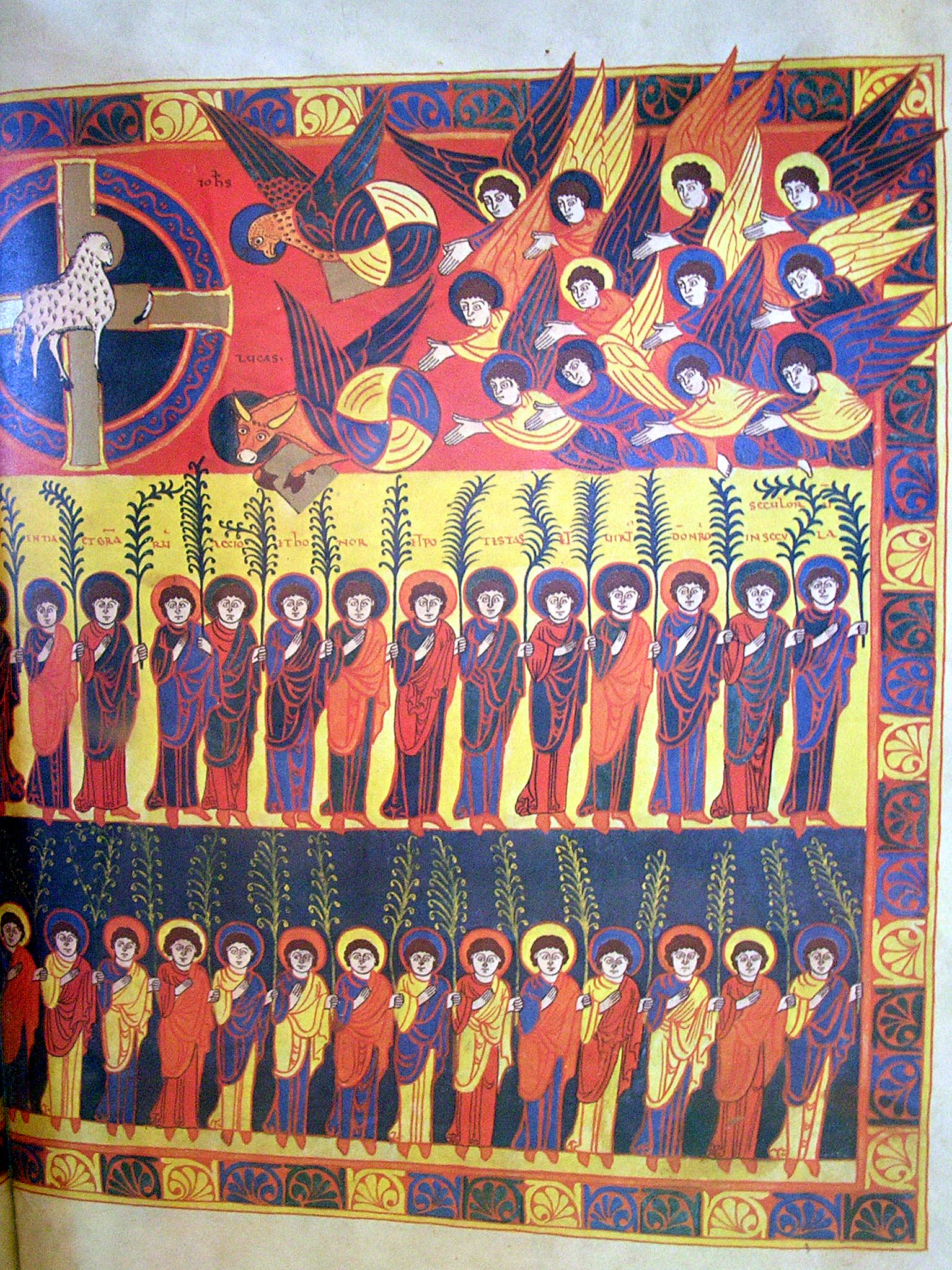 Abbaye bénédictine de Saint-Sever, dans les Landes (France) : le Beatus Photo prise par Jibi44 en juillet 2006